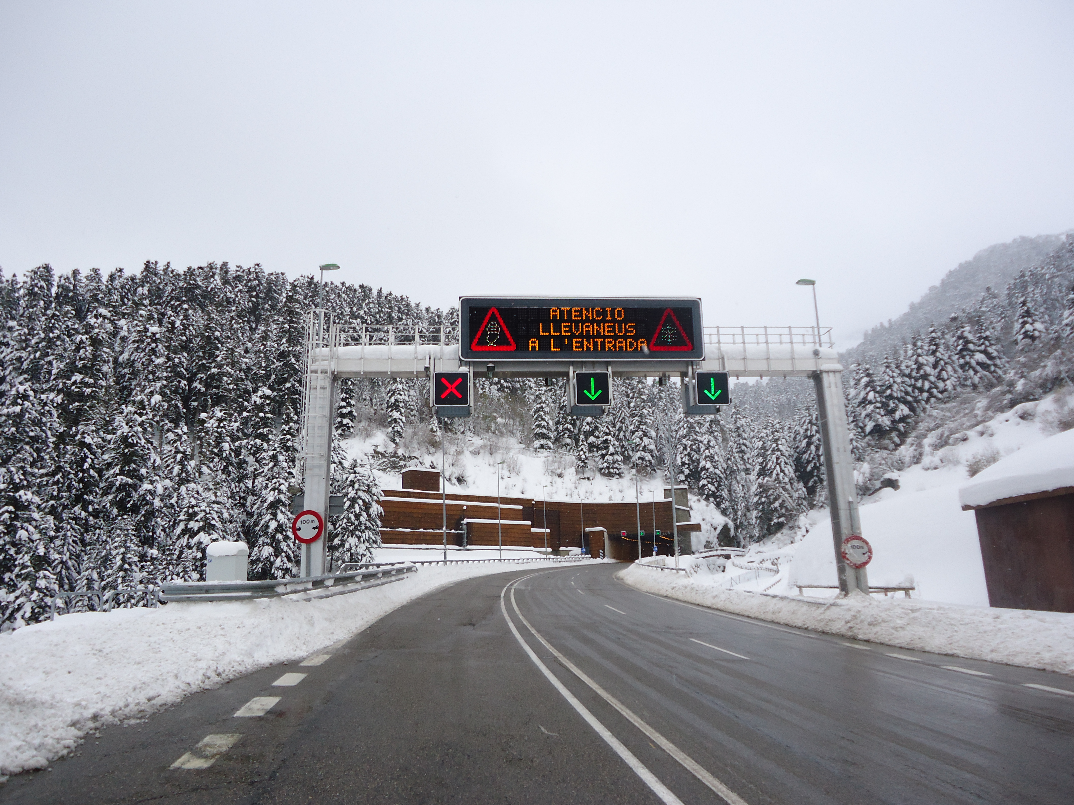 Imagen de la boca norte del Túnel de Vielha - Juan Carlos I